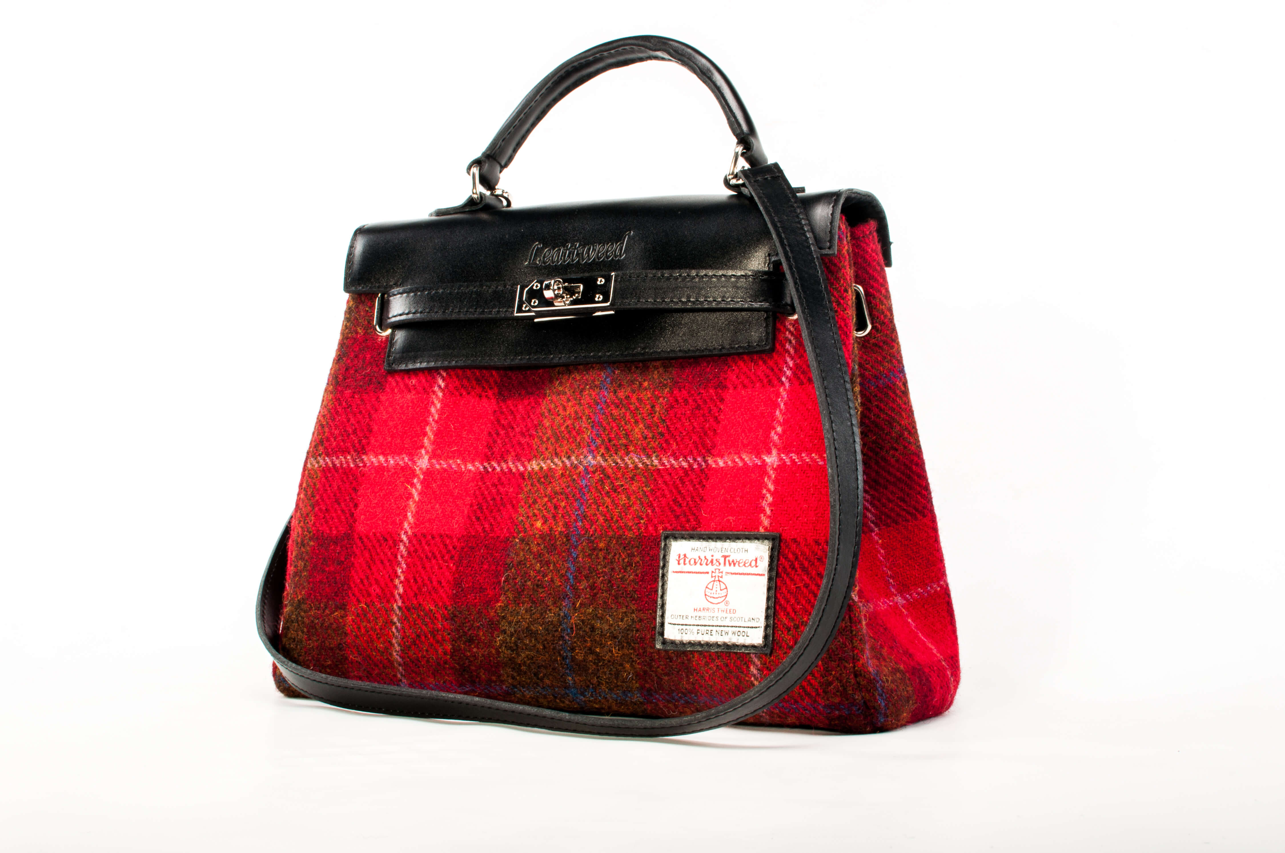 Harris Tweed Bag Leattweed